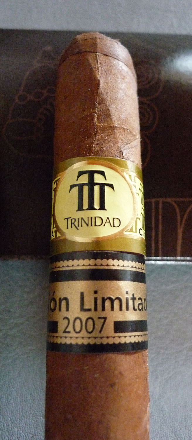 Trinidad Ingenios Limitierte Habano (im deutschen Sprachraum als Havanna-Zigarre oder kurz Havanna bekannt) mit mindestens zwei Jahre alten, reifegelagerten Tabak; umgeben von ölig-dunklen Maduro-Deckblättern. (Maduro = dunkles Braun)